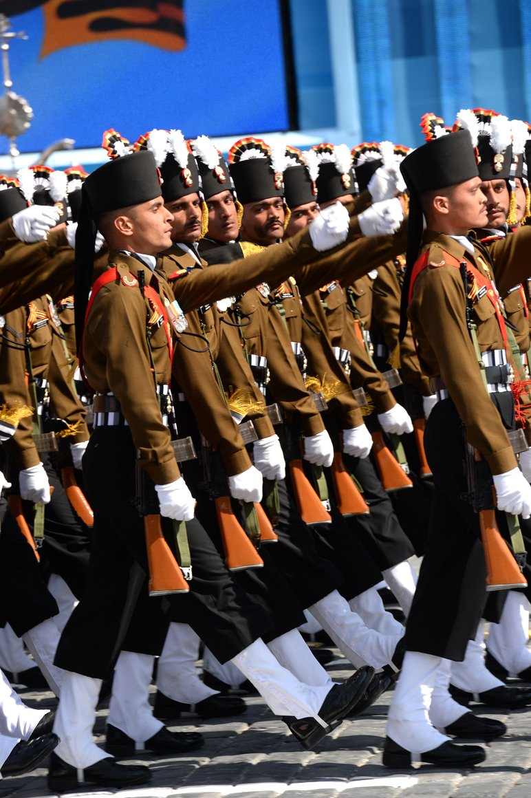 Военнослужащие гренадерского полка Вооруженных сил Индии во время военного парада в ознаменование 70-летия Победы в Великой Отечественной войне 1941–1945 годов.